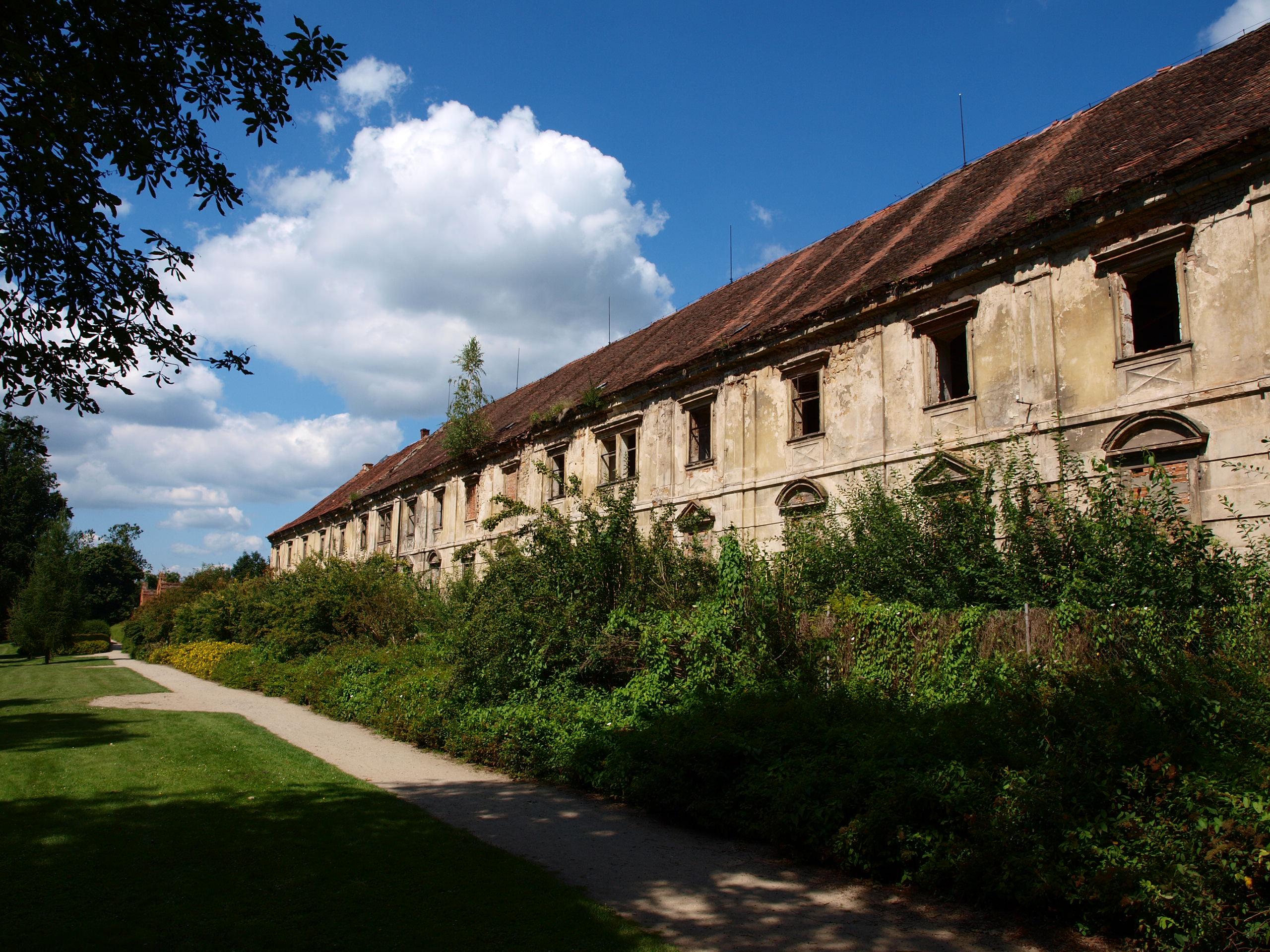 Hospodářská stavba v parku